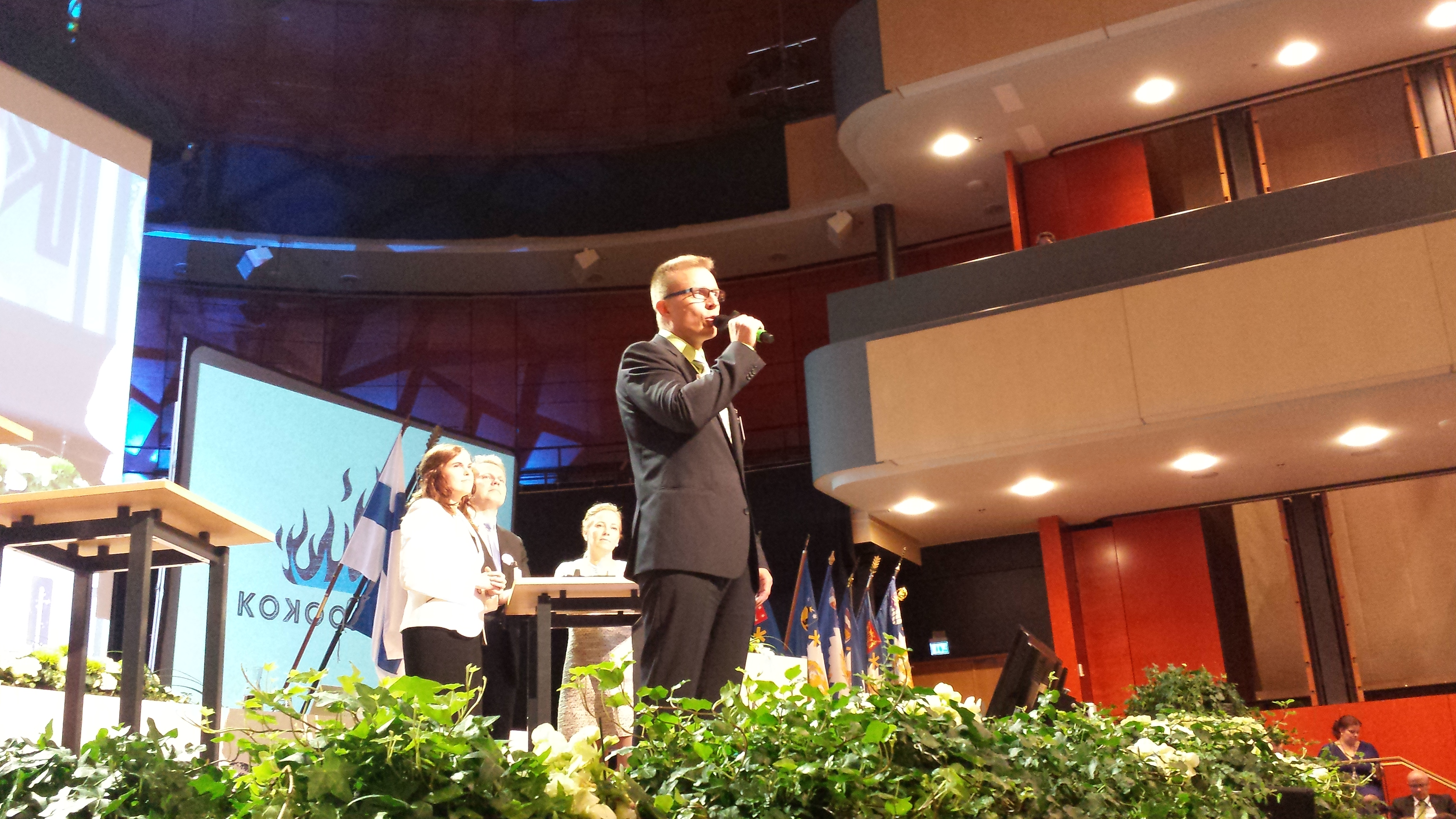 Jukka Kopra. Sibeliustalo, Lahti